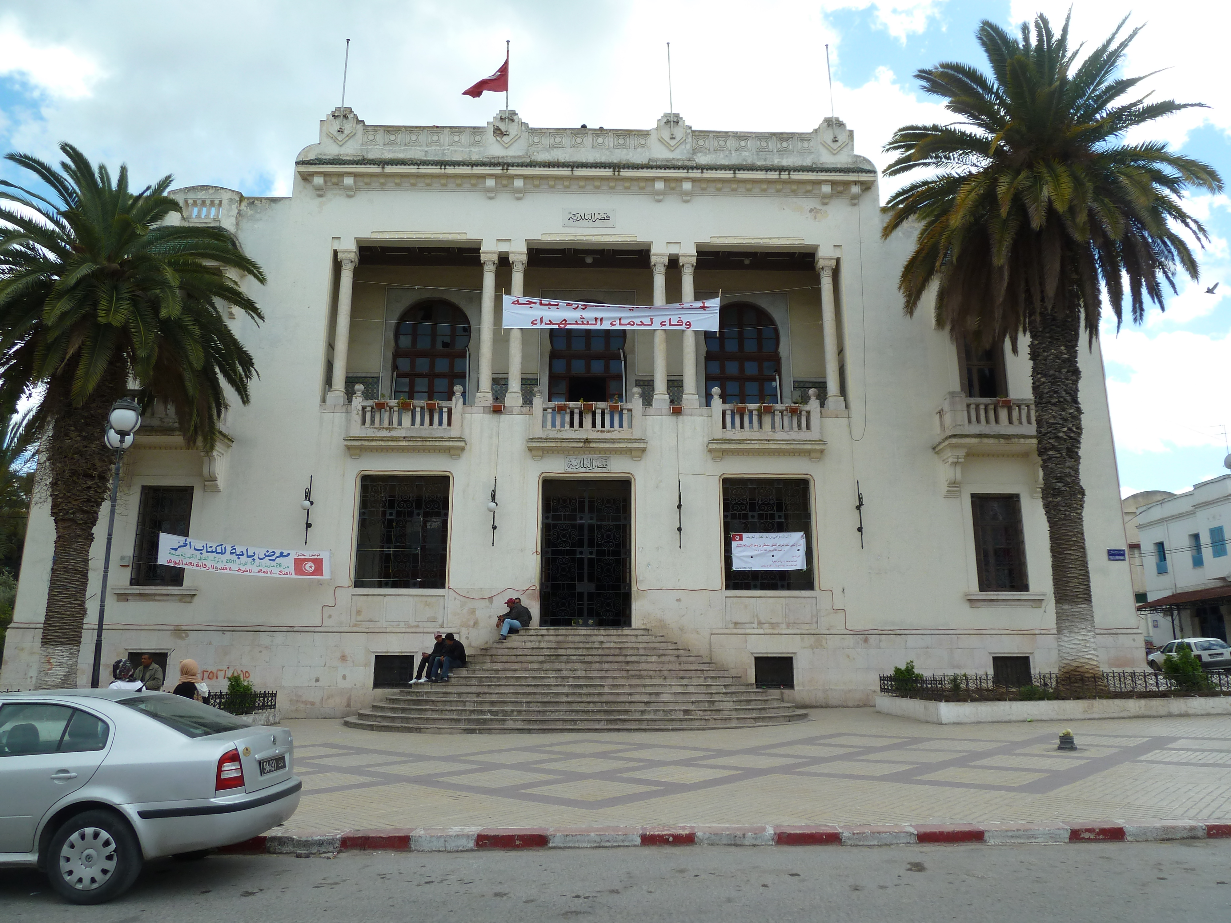 Mairie de la ville de Béja dans l'ouest tunisien.